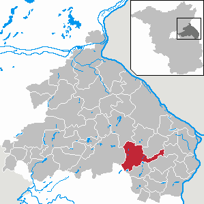 Vierlinden in Brandenburg (Country) - District Märkisch-Oderland